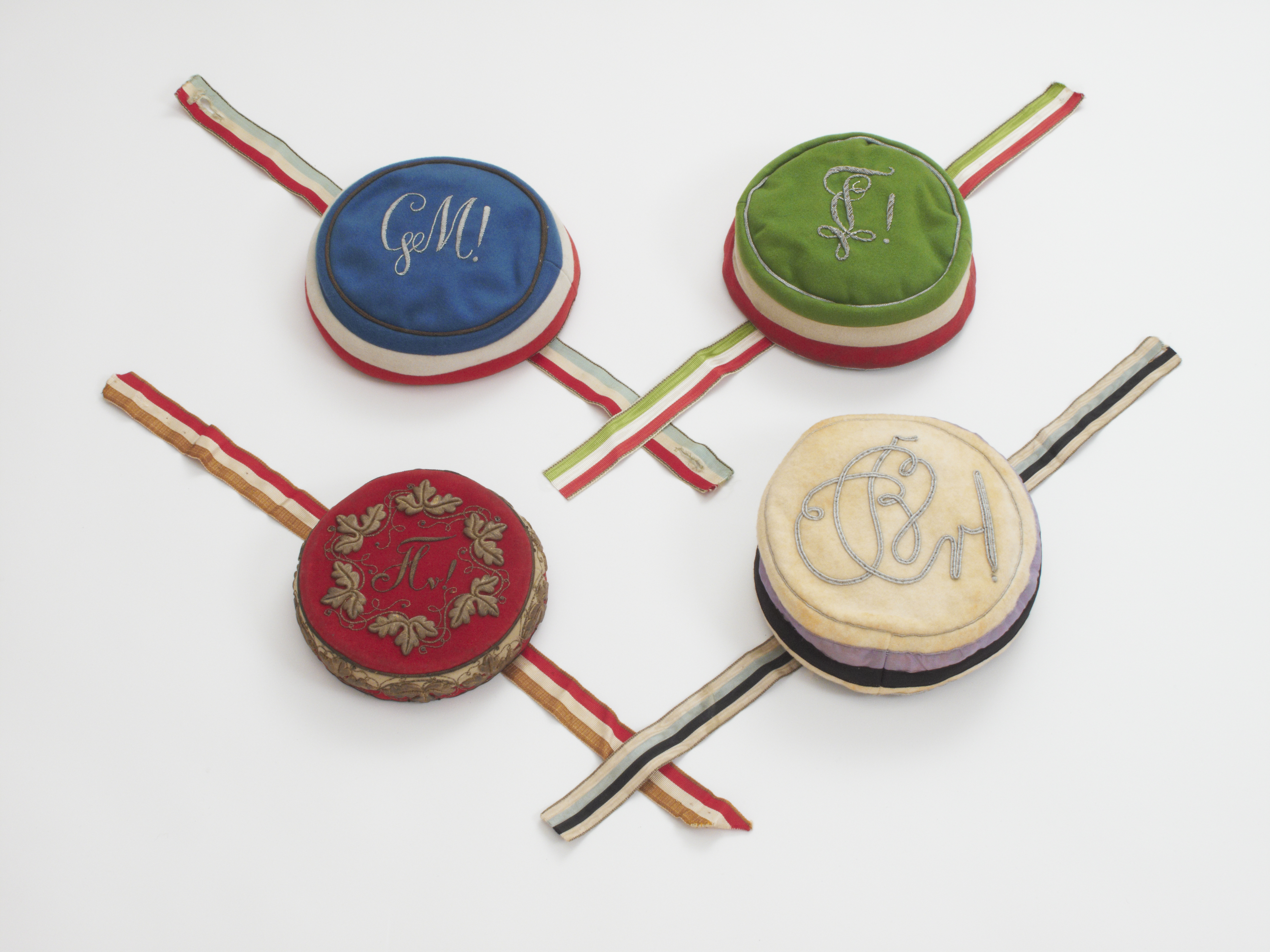 Tönnchen und Bänder der vier Königsberger Corps (1935)